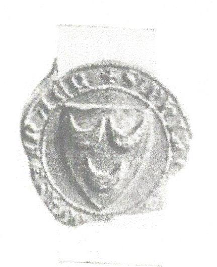 Zegel met wapen Philips van Wassenaer charter 25 april 1340, voor hij het burggraafschap Leiden bezat.